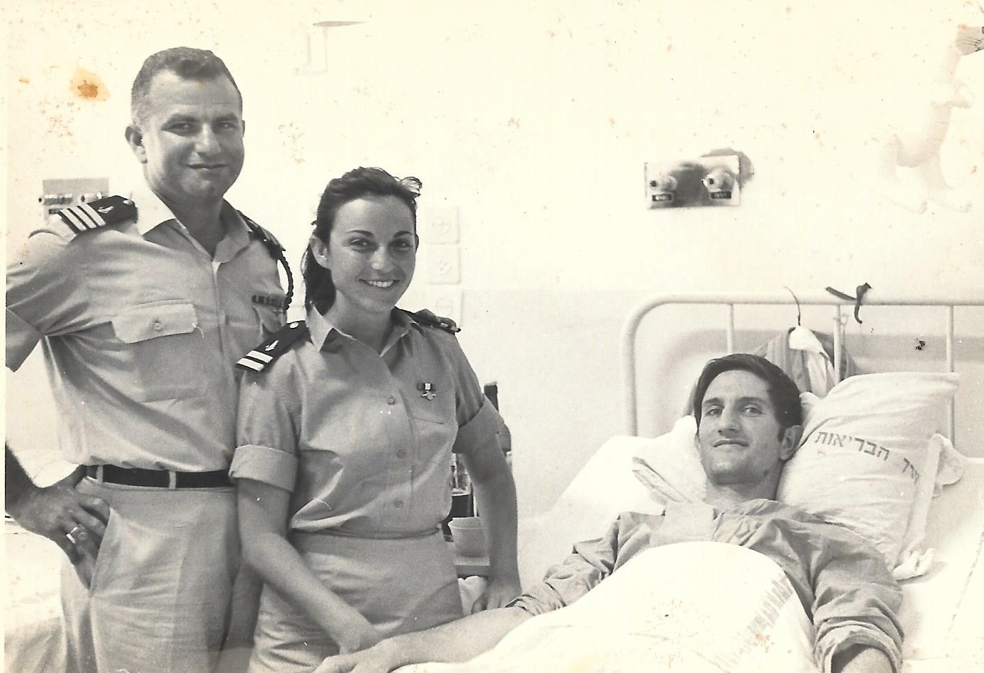 סא"ל שושן שכבר החלים יחד עם רסרן רינה לוי מבקרים בבית החולים את סגן דני גל פצוע קשה מטיבוע המשחתת אילת.